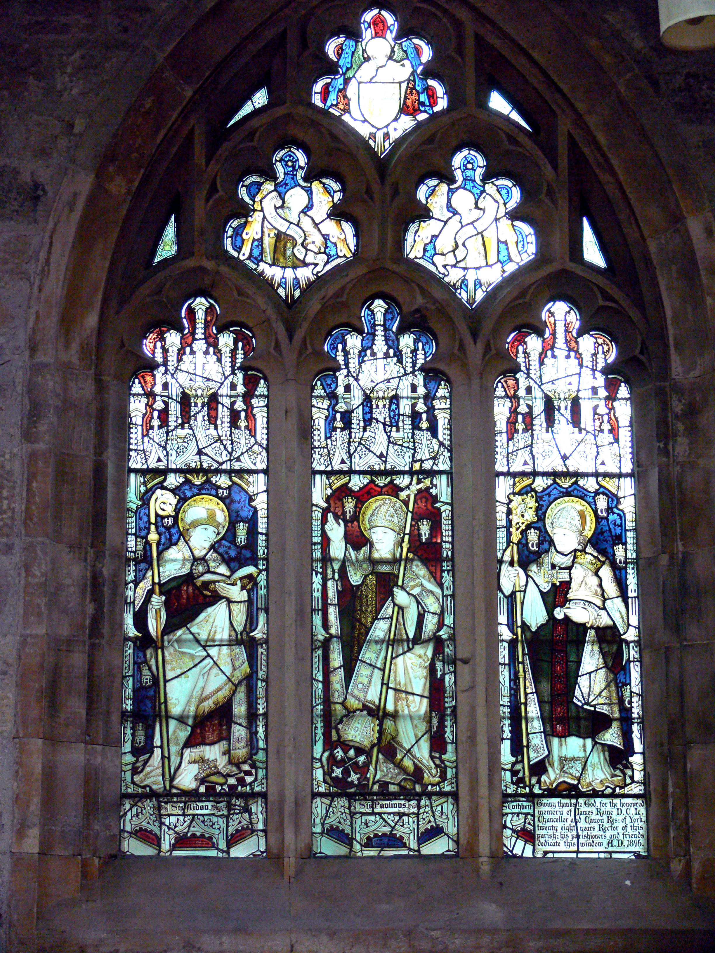 Fenster der Kirche All Saints Pavement in York. Links St. Aidan von Lindisfarne (+ 651) Mitte: St. Paulinus von York (584 - 644) rechts: St. Cuthbert von Lindisfarne (635 - 687)